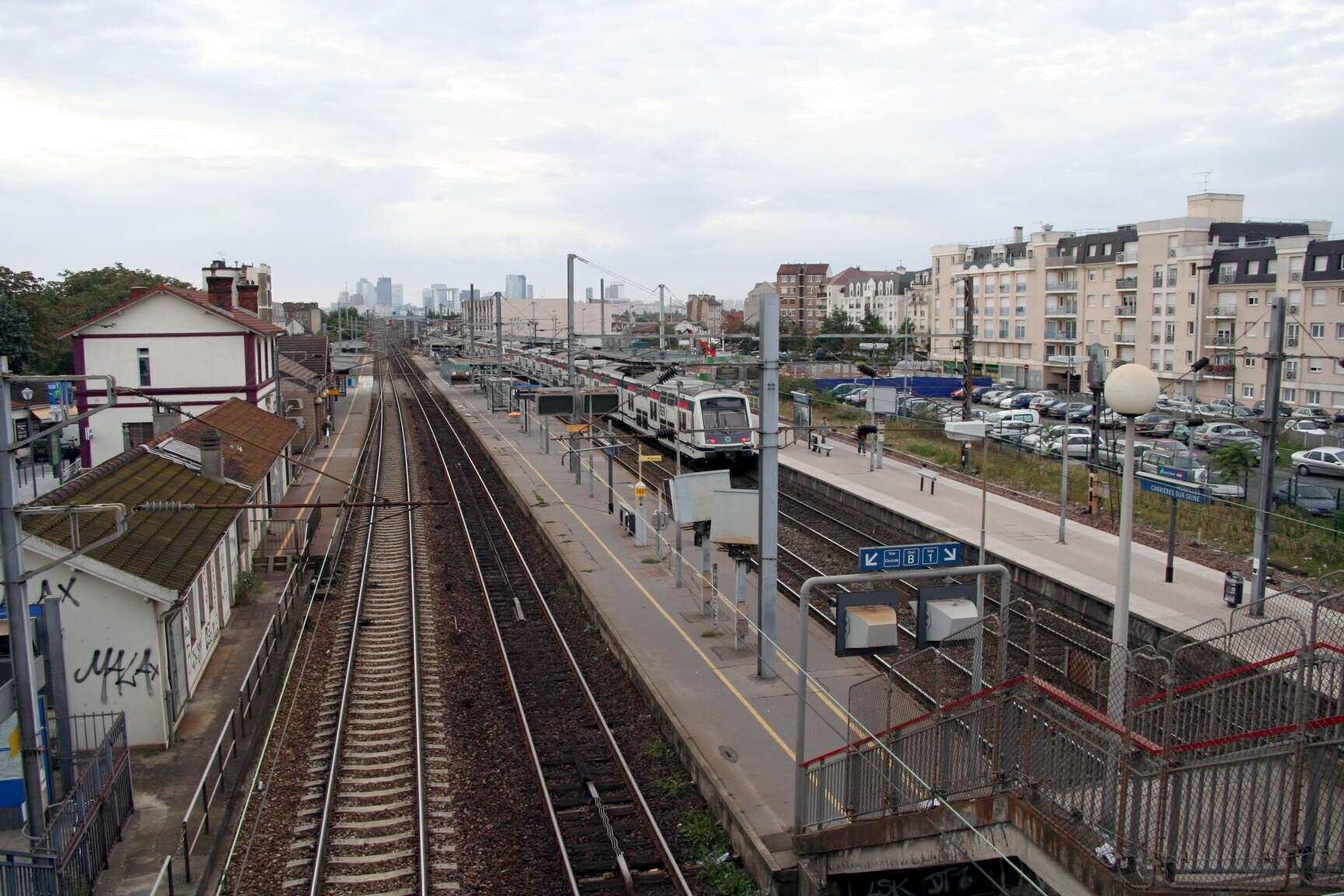 Gare de Houilles - Yvelines (France)